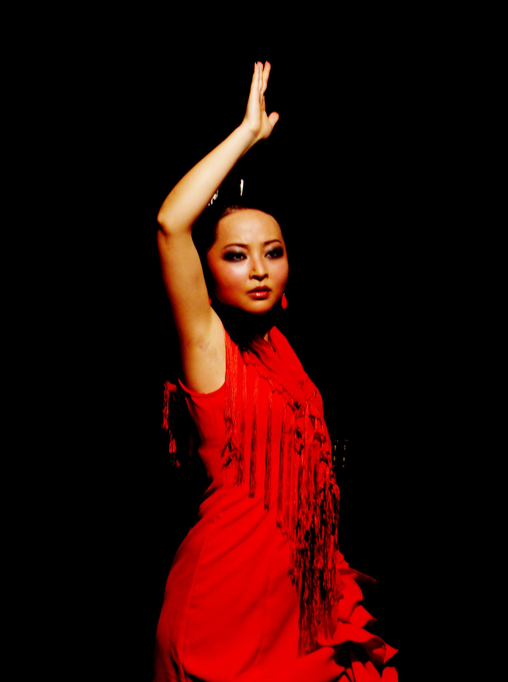 Photo de la danseuse de Flamenco Mari-Zhen